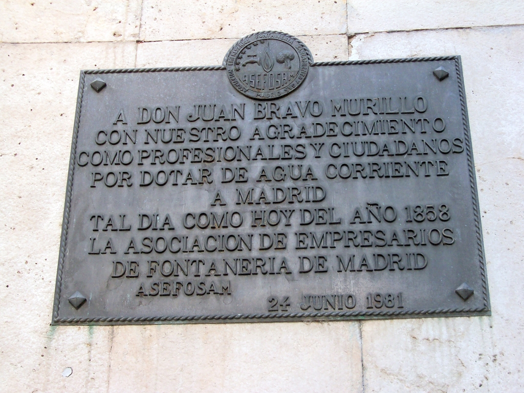 Monumento a Bravo Murillo en Madrid, en la confluencia de la avenida del mismo nombre con la de José Abascal : Placa conmemorativa de la inauguración del Canal de Isabel II dedicada al político en 1981 por la Asociación de Empresarios de Fontaneria , Sanaeamiento y Gas de Madrid